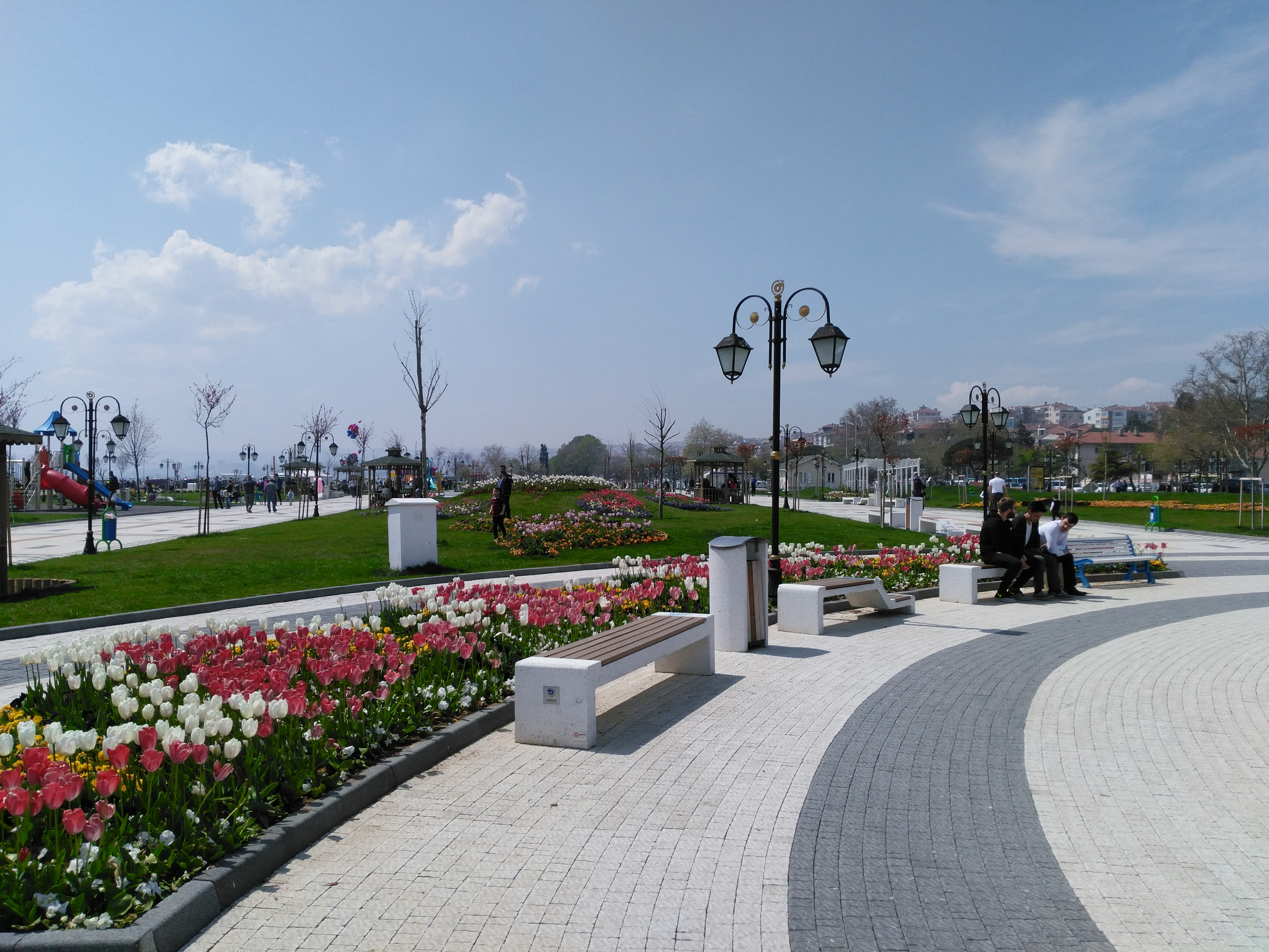 Süleymanpaşa sahil yolu ve peyzajı.